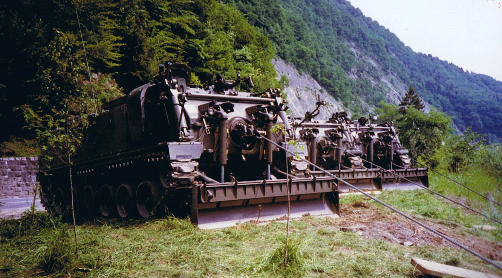 Drei Entpannungspanzer 65 bei der Arbeit